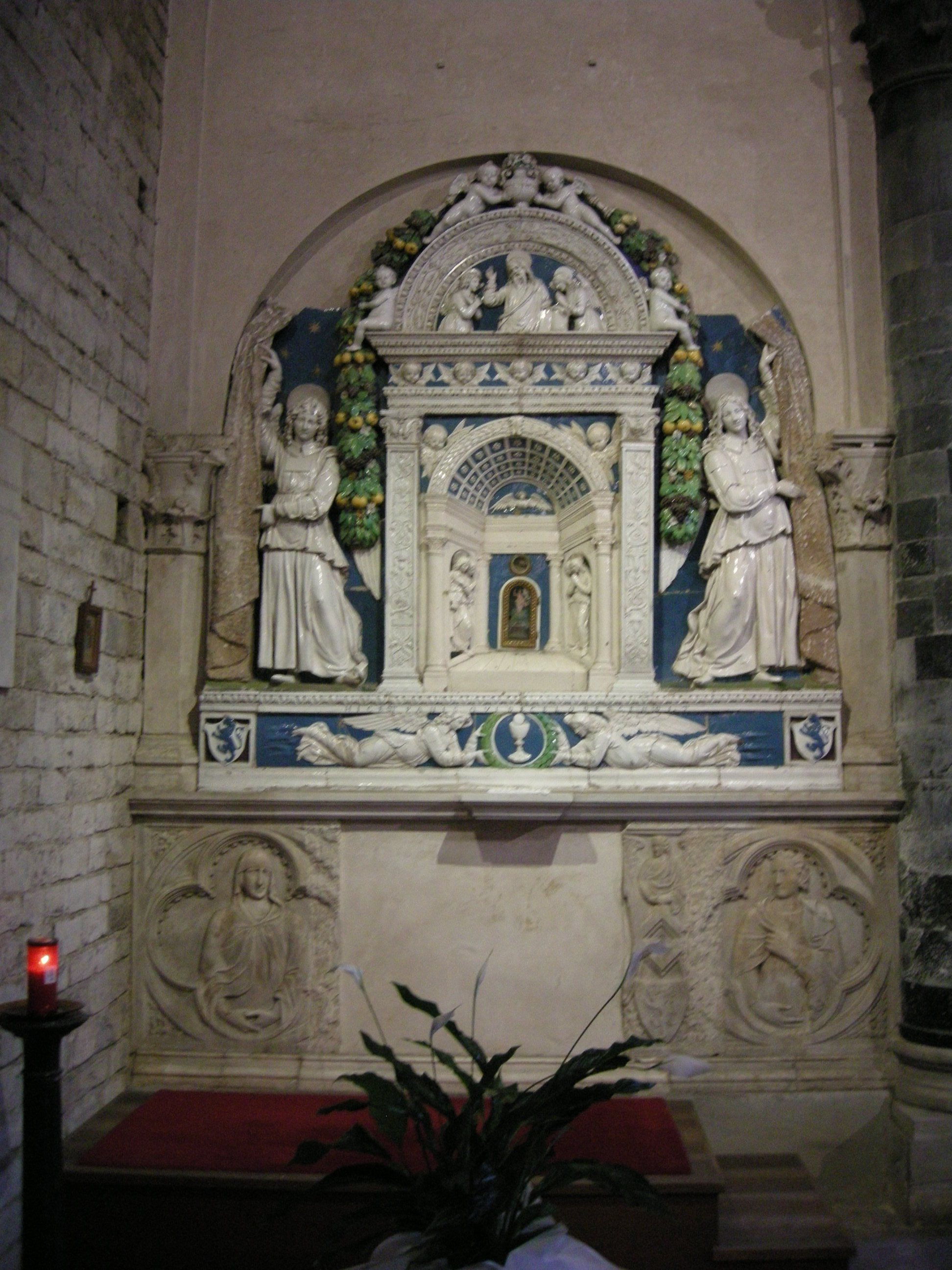 Santi apostoli, firenze, interno, tabernacolo di Giovanni della Robbia